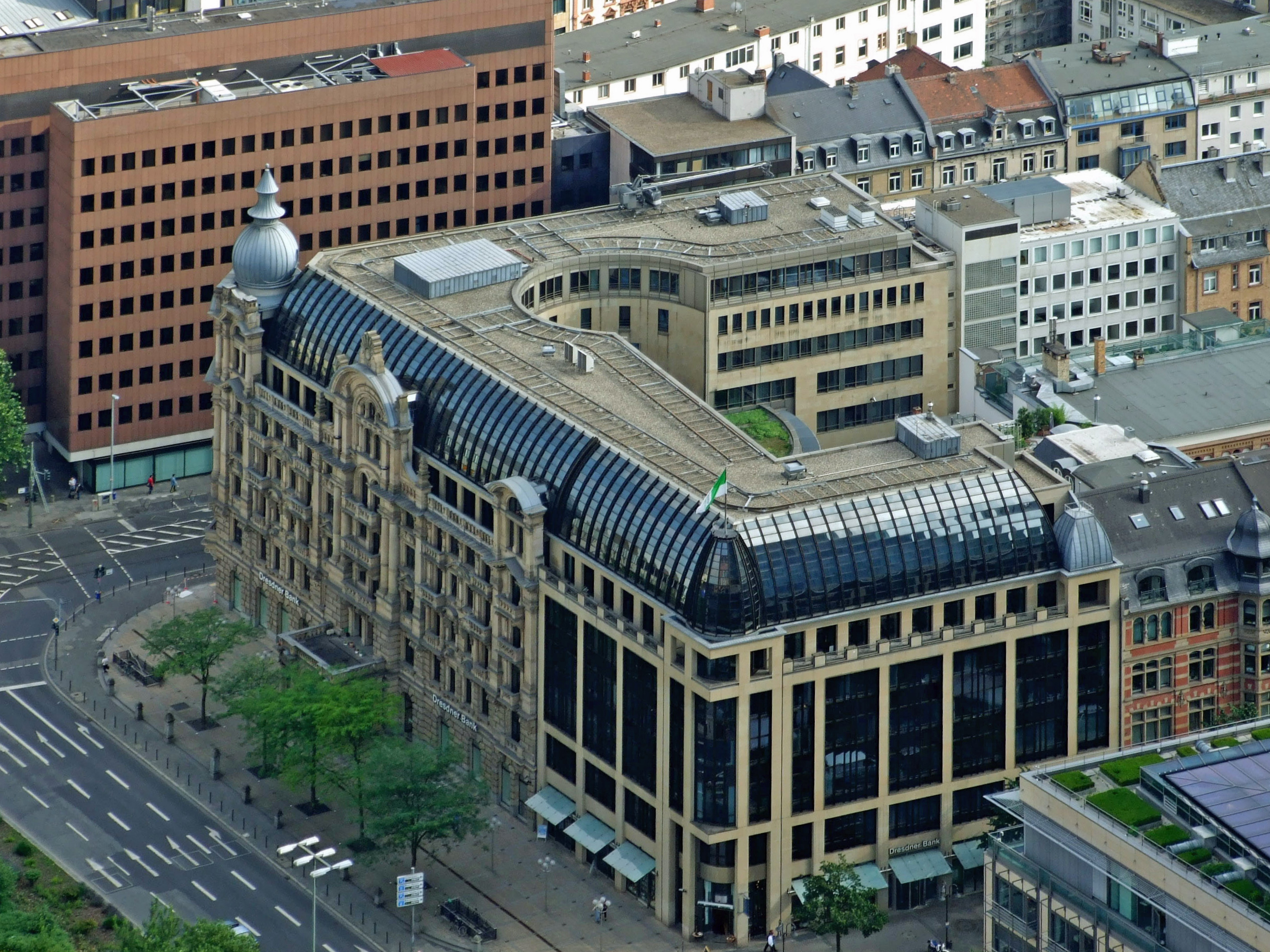 Der sogenannte Fürstenhof, Hauptgeschaeftsstelle der Dresdner Bank in Ffm